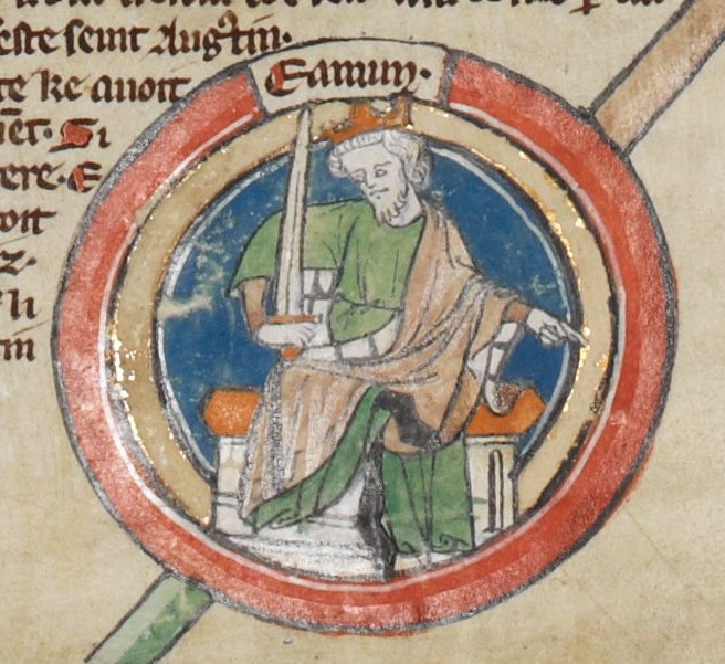 Miniature d'Edmond Ier dans une généalogie royale du XIVe siècle.